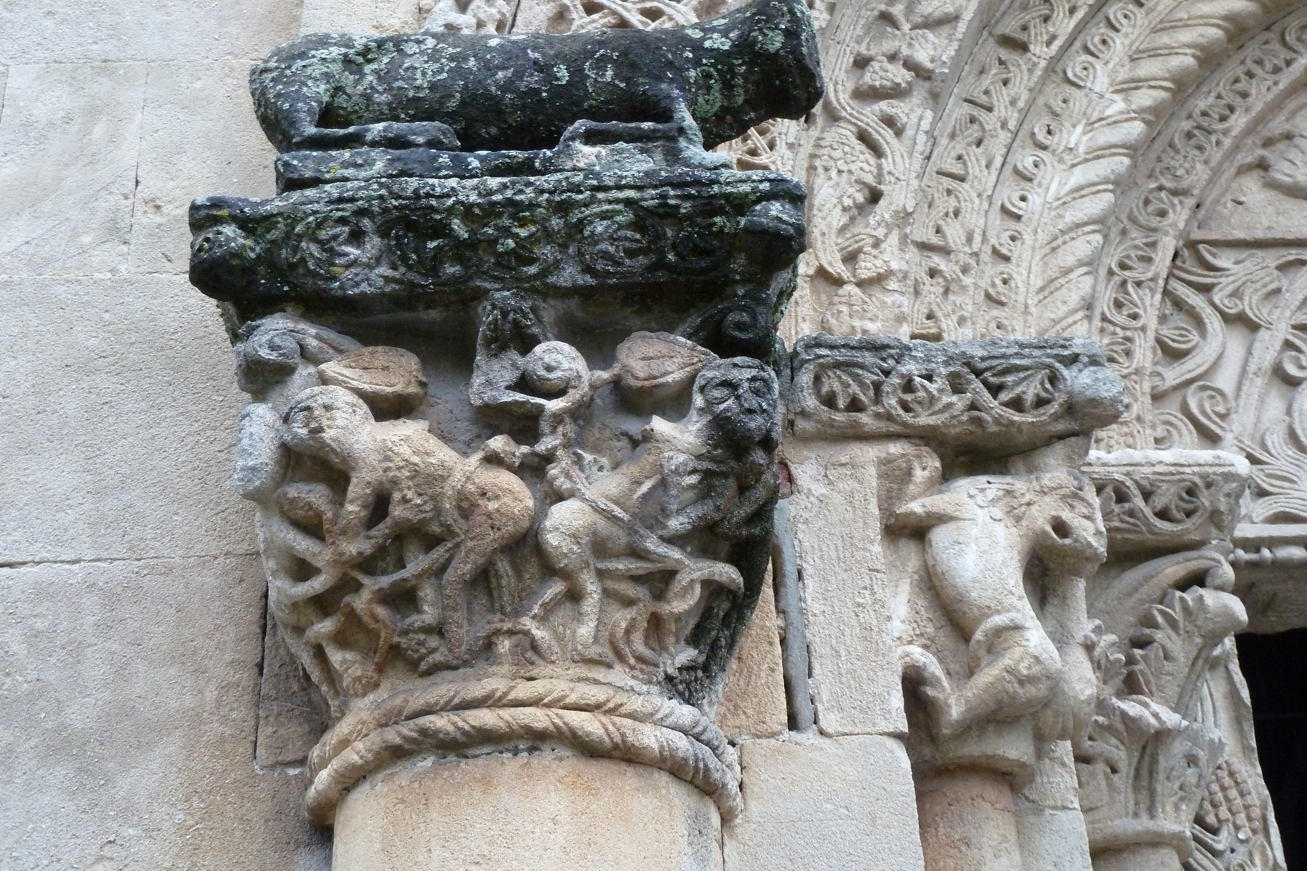 Kapitell am Portal Santa von Fede Cavagnolo